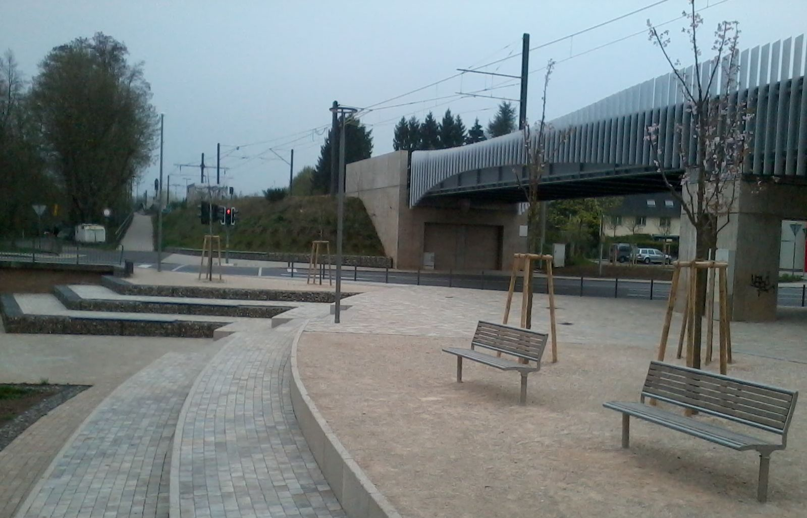 Walpershofens neue "Dorfmitte am Bach" (eröffnet am 27.09.2013) und die 2010 erneuerte Saarbahnbrücke (Eisenbahnüberführung über die L136)